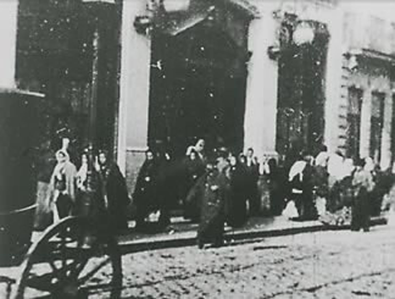 Fotograma do filme Saída do Pessoal da Fábrica Confiança] - (Porto)